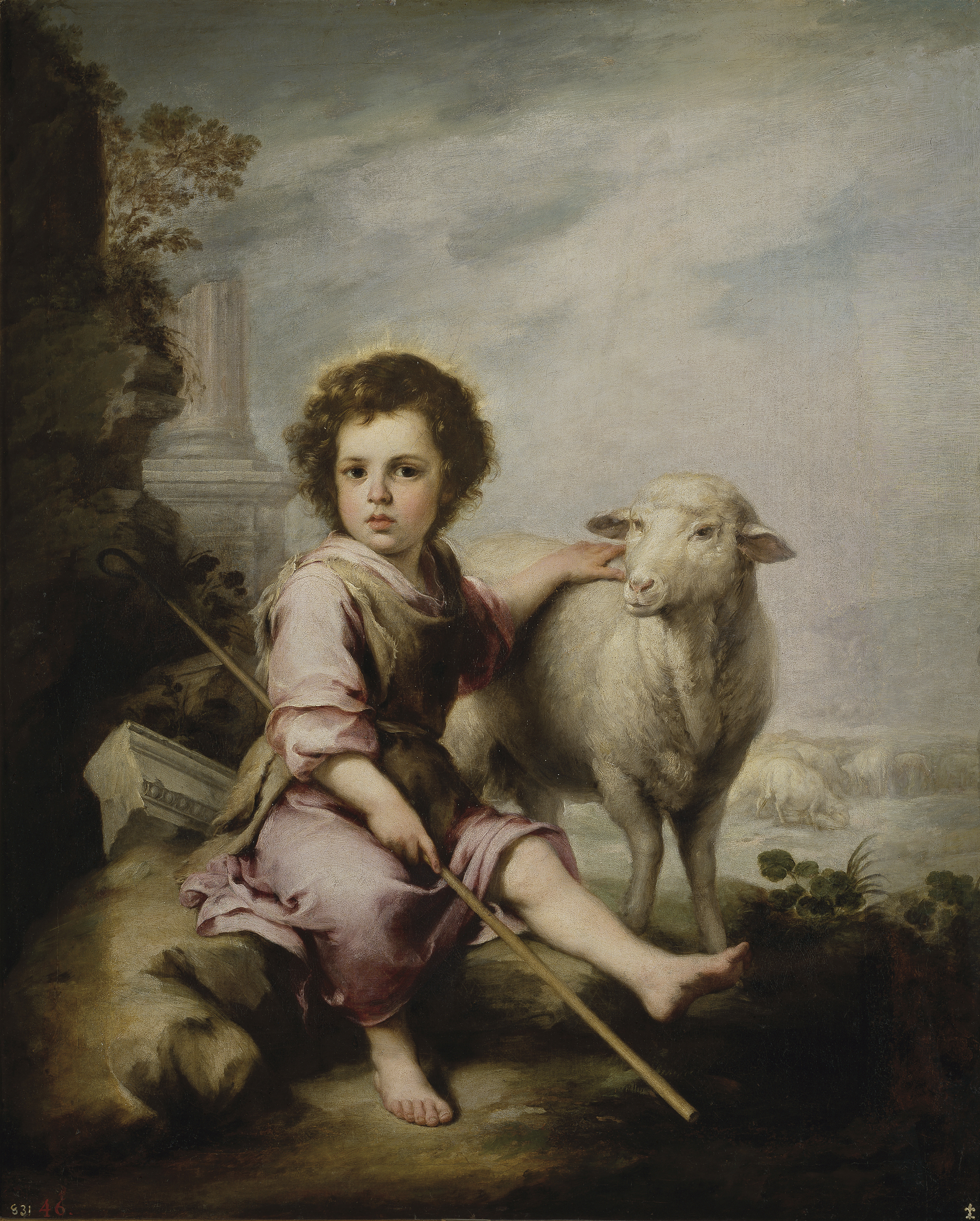 En esta obra el Niño Jesús es mostrado en relación con la metáfora bíblica del Buen Pastor que apacienta y cuida a su rebaño, y conviene señalar que Bartolomé Esteban Murillo se hizo célebre por sus representaciones de temas infantiles. Este tipo de representaciones tuvo un notable éxito la sociedad sevillana de la época de Murillo, y la «ternura y devoción» que inspiran han perdurado a través de los siglos, como señalan algunos autores. Y en esta obra, al igual que en muchas otras salidas de sus manos, Murillo destacó a la hora de combinar un estilo «sabio y delicado con un contenido amable y dulce».